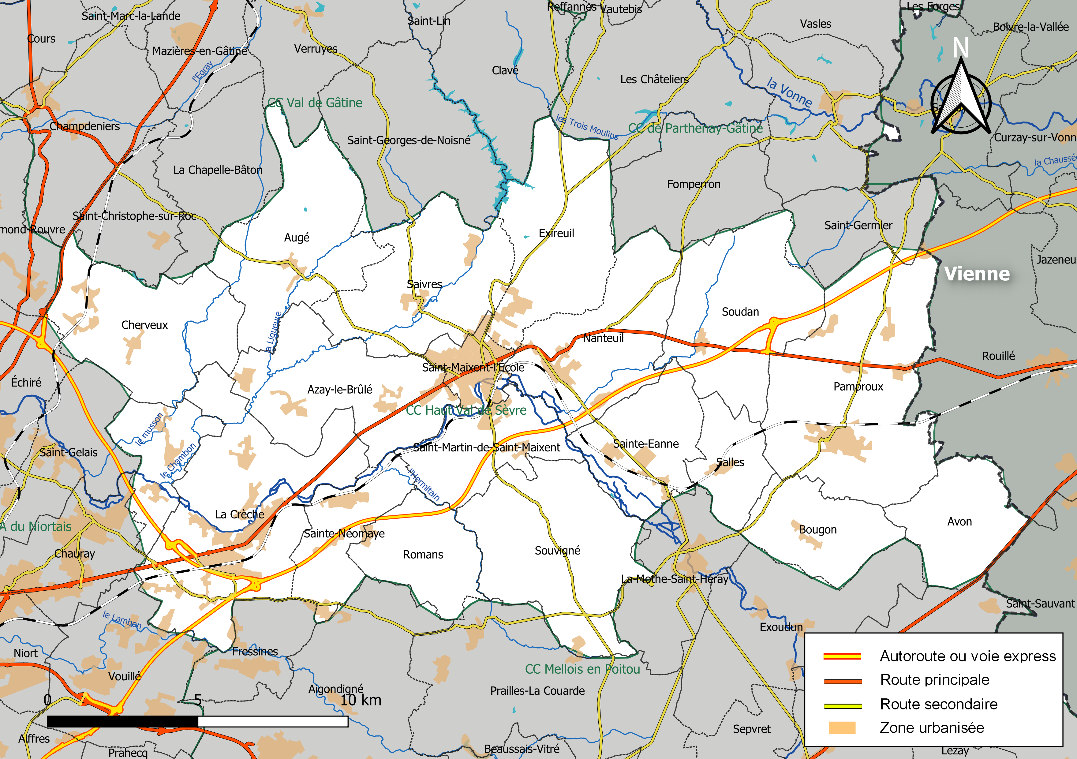 Carte géographique de la Communauté de communes Haut Val de Sèvre, département des Deux-Sèvres, France. Composition au 1er janvier 2019.